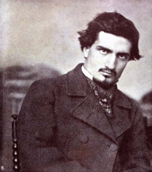 Michele Tedesco (1834 - 1917), pittore